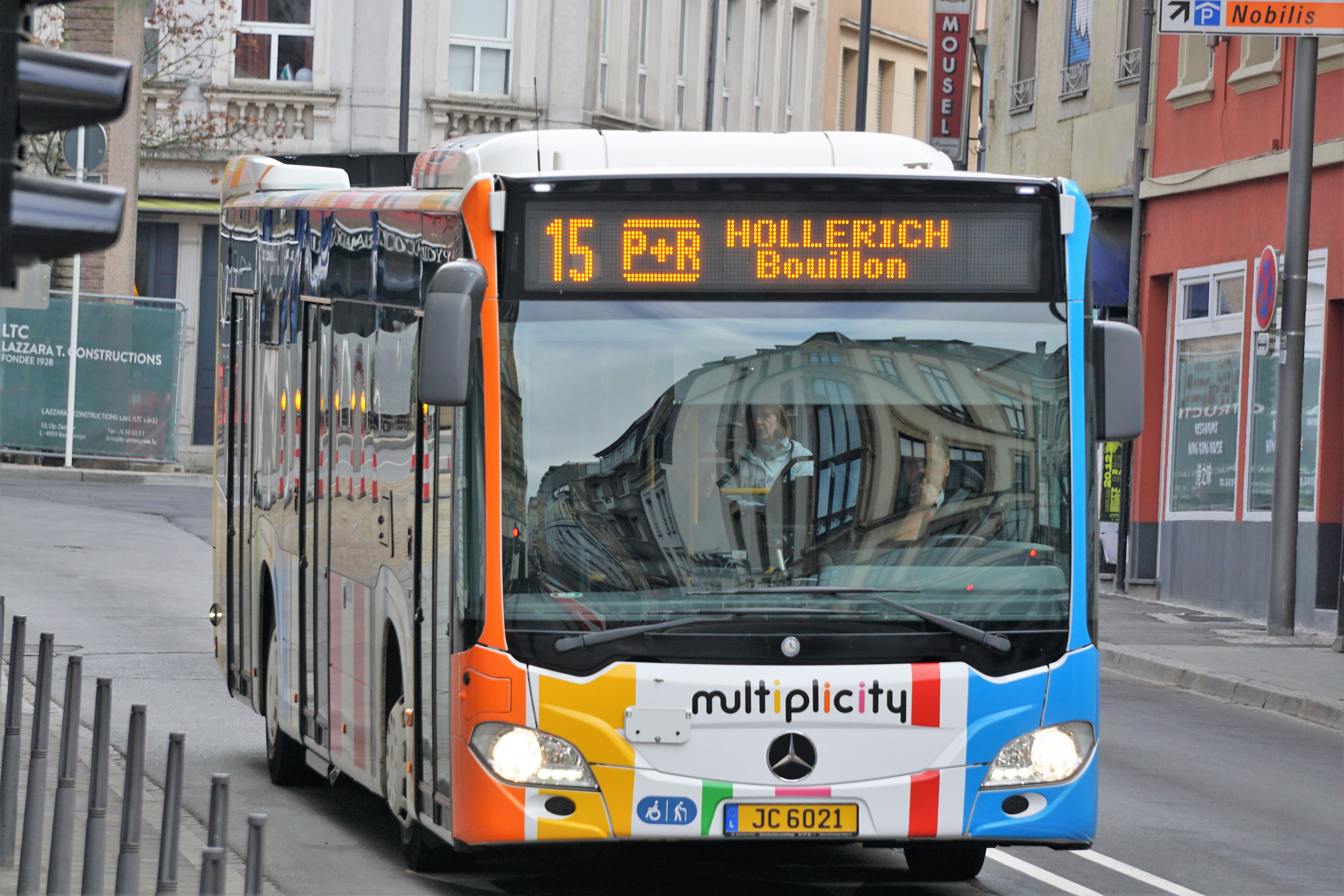 Luxembourg, bus AVL-Clement 638 (#JC6021) sur une ligne 15 dans la rue de Bonnevoie en direction de Hollerich.